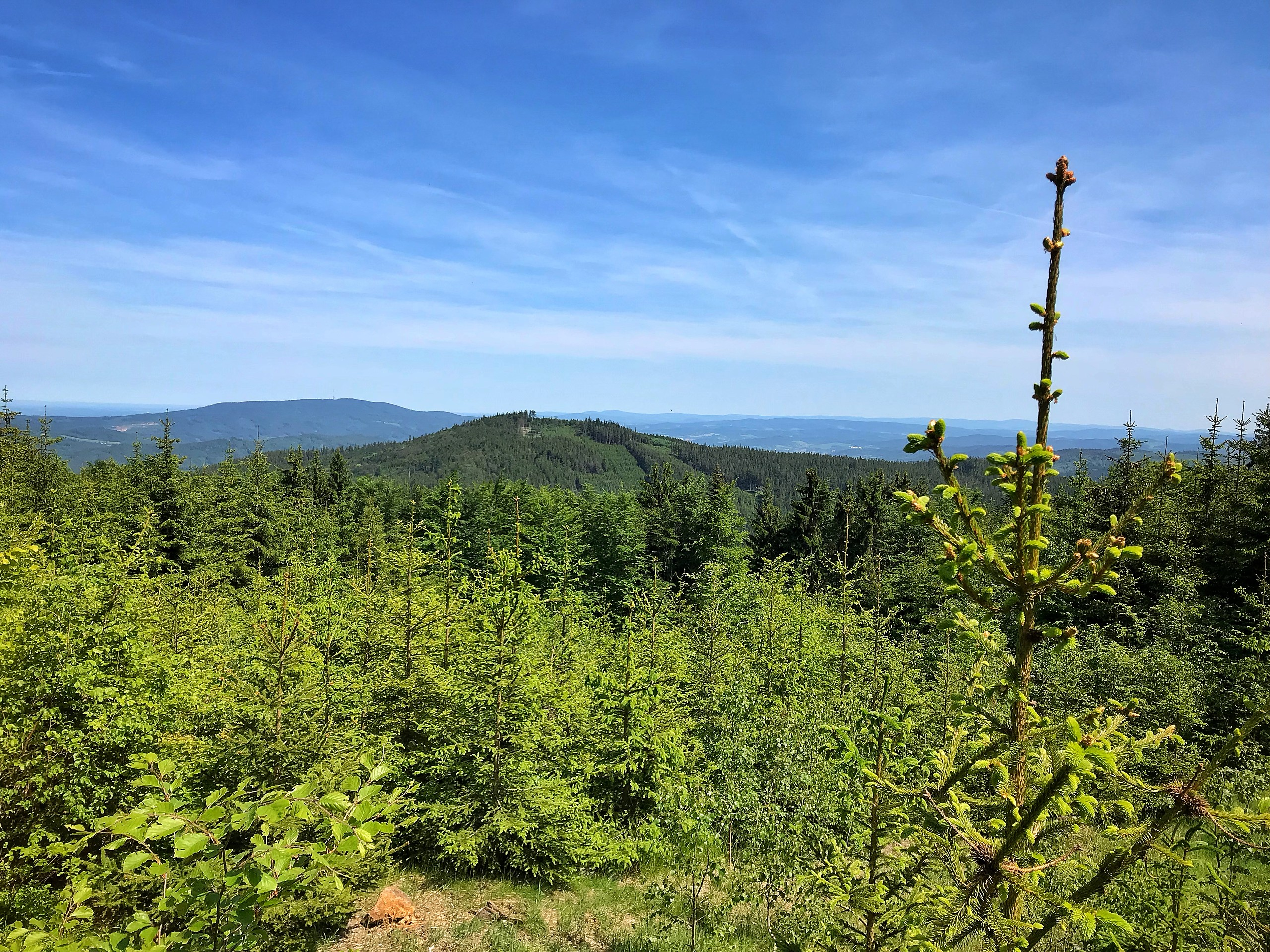 Plešný (1066 m) na Šumavě